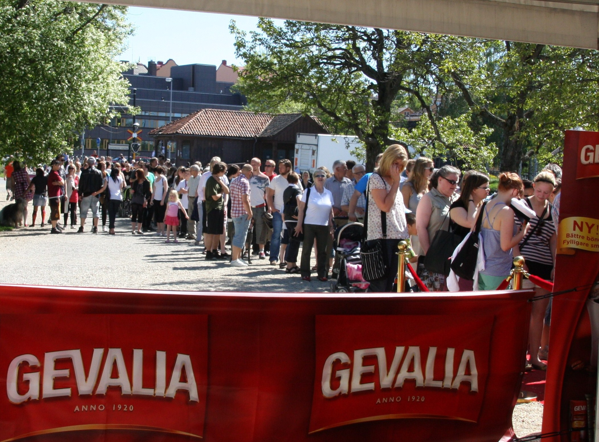 Fikasugna Östersundsbor köar i sommarvärmen.